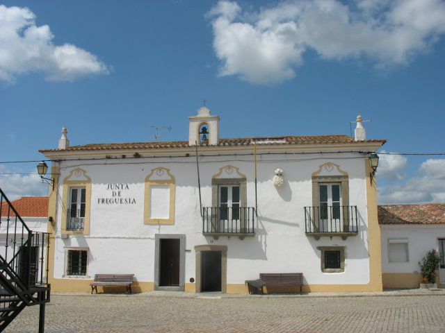 Antigos Paços do Ceoncelho de Pavia. Atual sede Junta de Freguesia de Pavia (concelho de Mora).